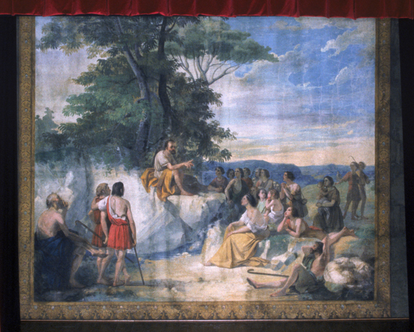 Adeodato Malatesta, Esopo che parla ai pastori (5,80m x 7,30m), sipario del teatro comunale Alice Zeppelli di Pieve di Cento (Bologna)